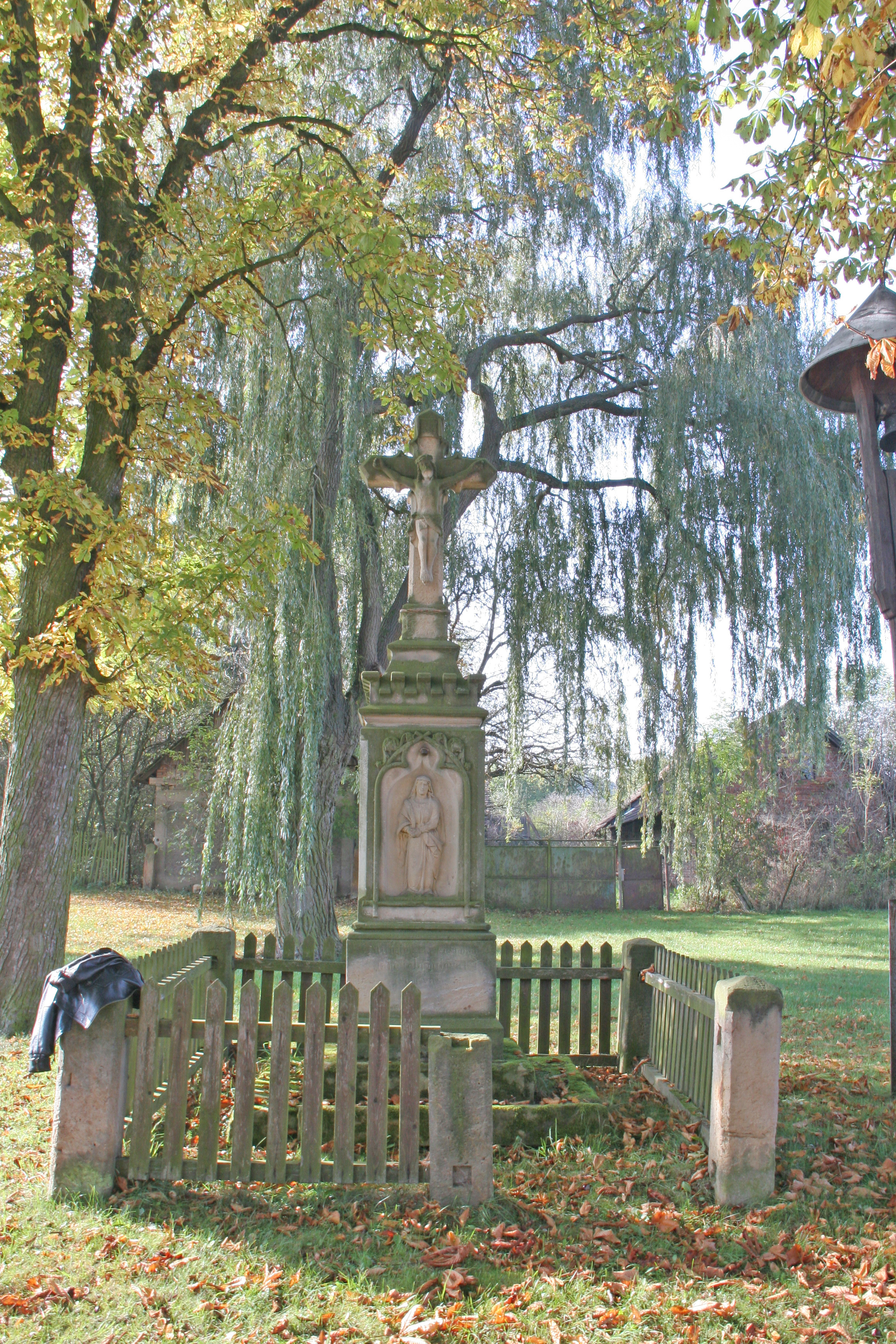 Žantov kříž